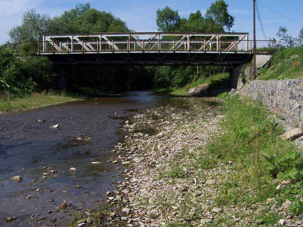 Stradomka